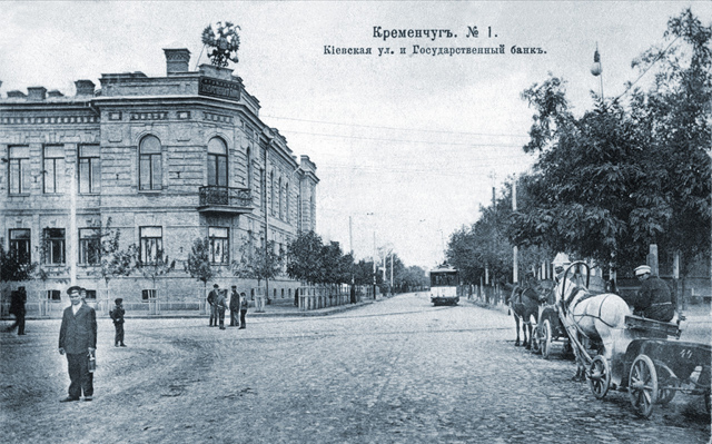 Postcards of old Kremenchuk. Вулиця Київська, теперішня Перемоги. Держбанк.